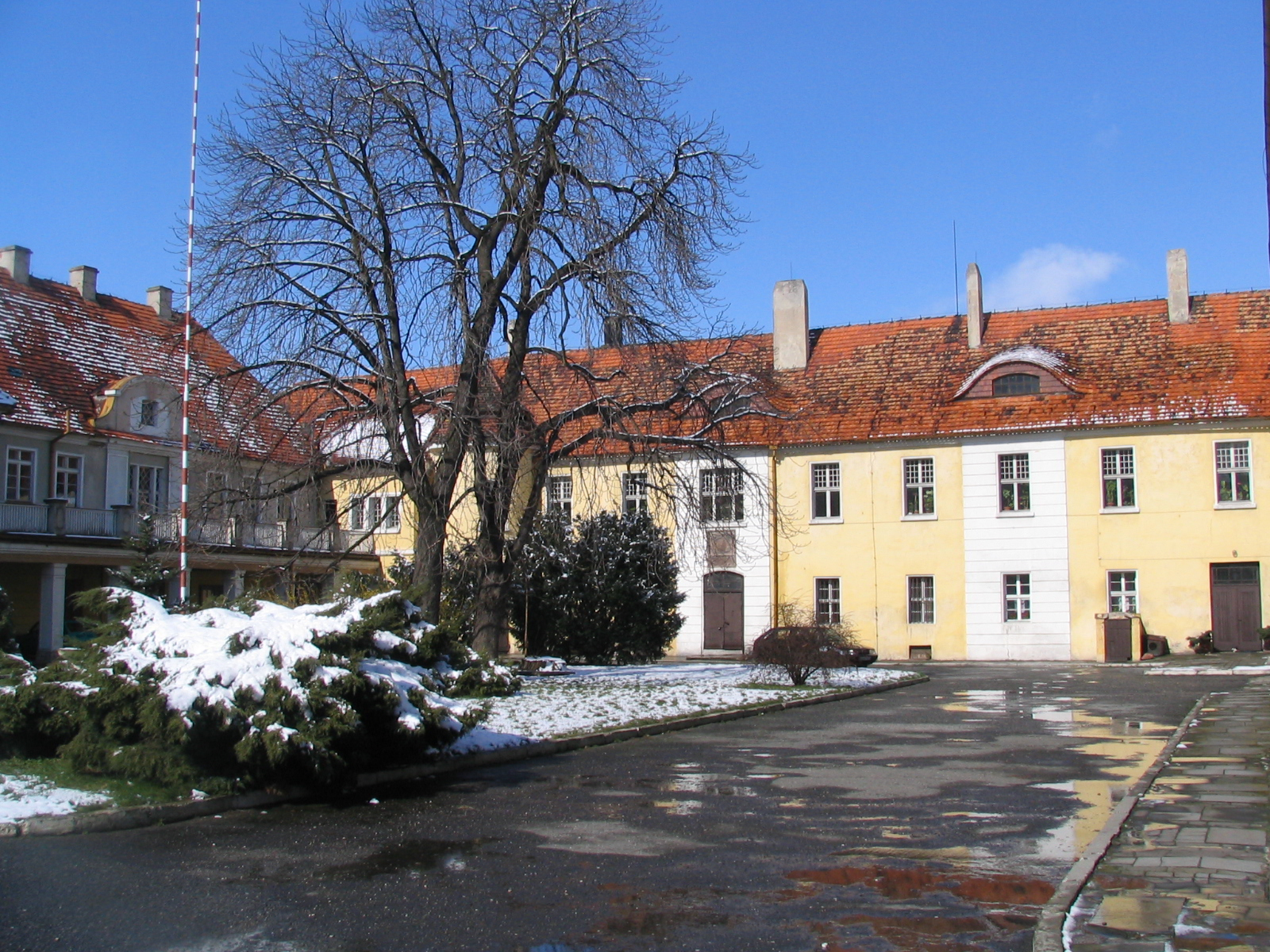 Innenhof des Schlosses Klein Oels.